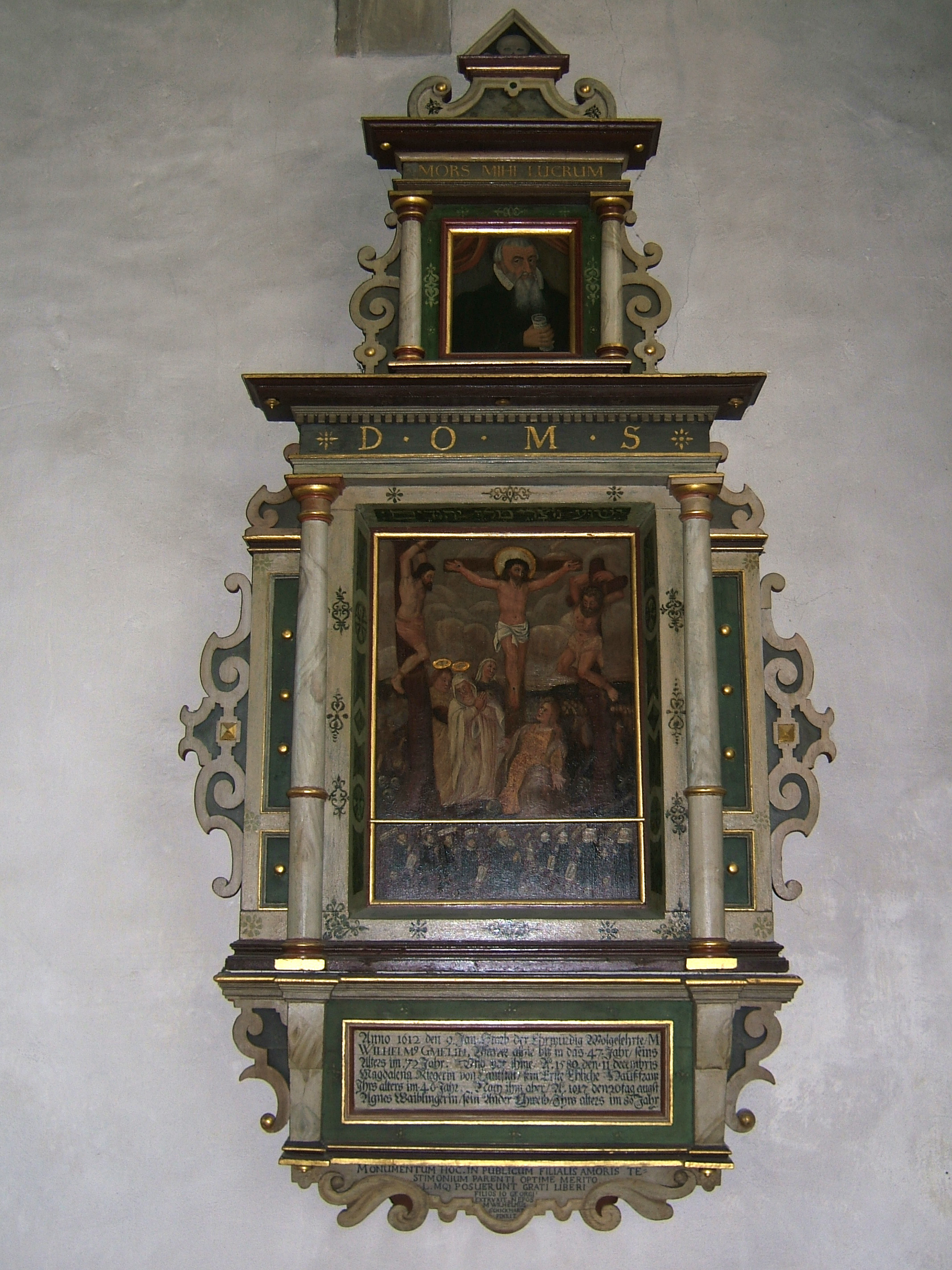 St.-Veit-Kirche Gärtringen, Epitaph für Magister Wilhelm Gmelin, gest. 1612